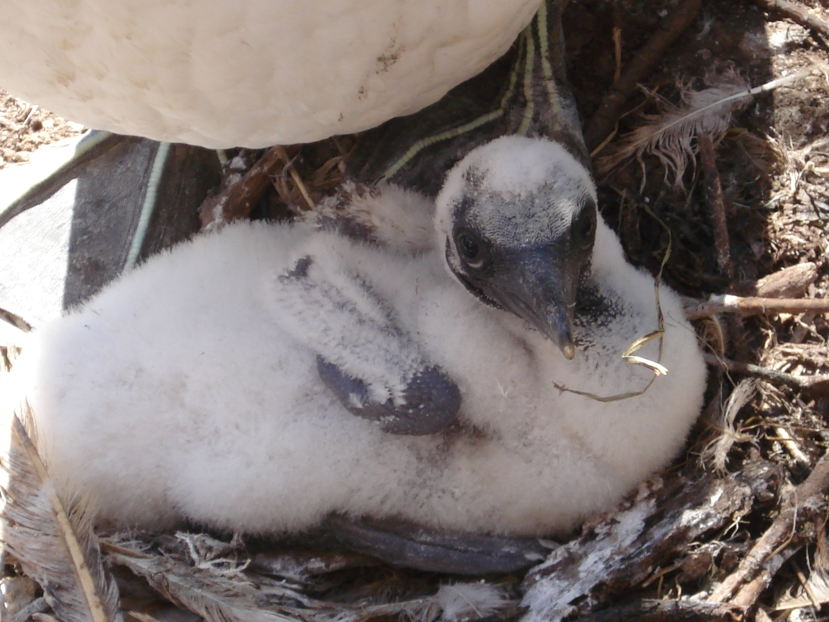 jeune fou de Bassan sur l'île de Bonnaventure (Gaspésie, Québec)